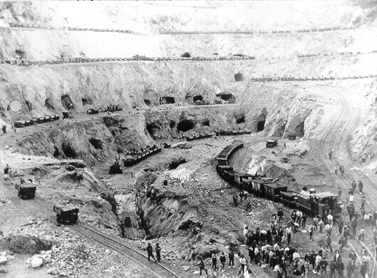 Explotación de la planta 16 de 18 de la mina a cielo descubierto de Corta Atalaya, en Minas de Riotinto, Huelva.